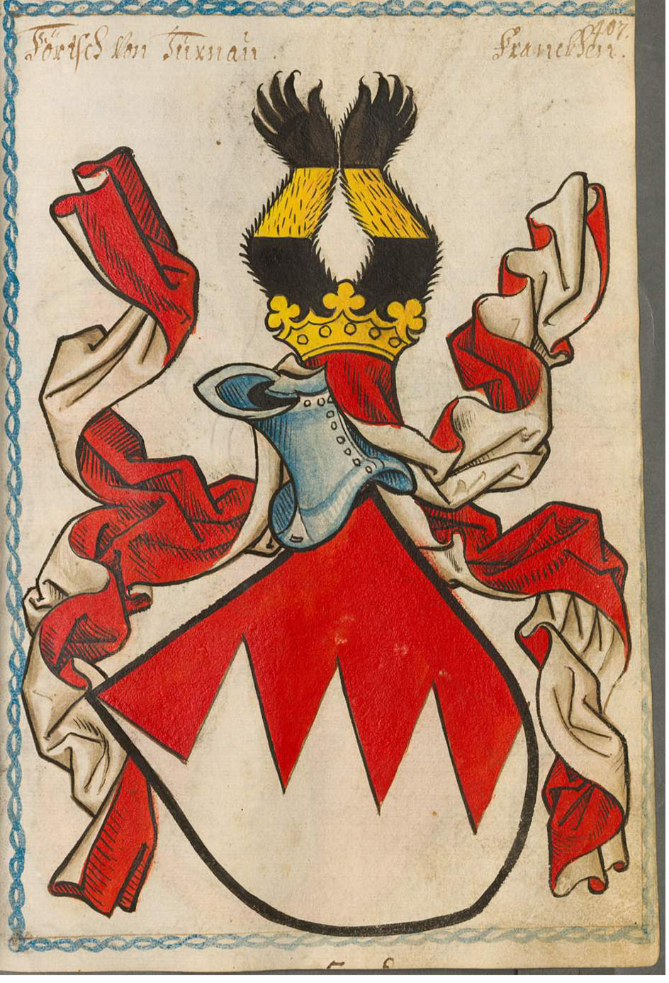 Scheibler'sches Wappenbuch , älterer Teil Förtsch von Turnau Franckhen